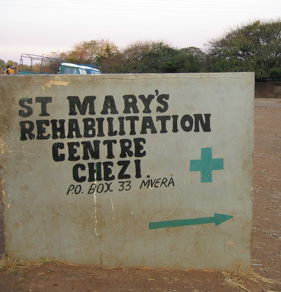 Cartel do centro St Marys Rehabilitation Center en Chezi (Malawi)